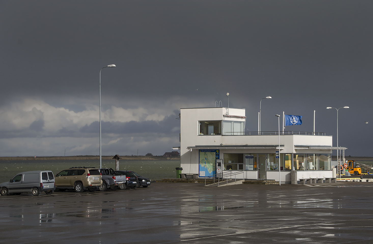 Munalaid Harbour